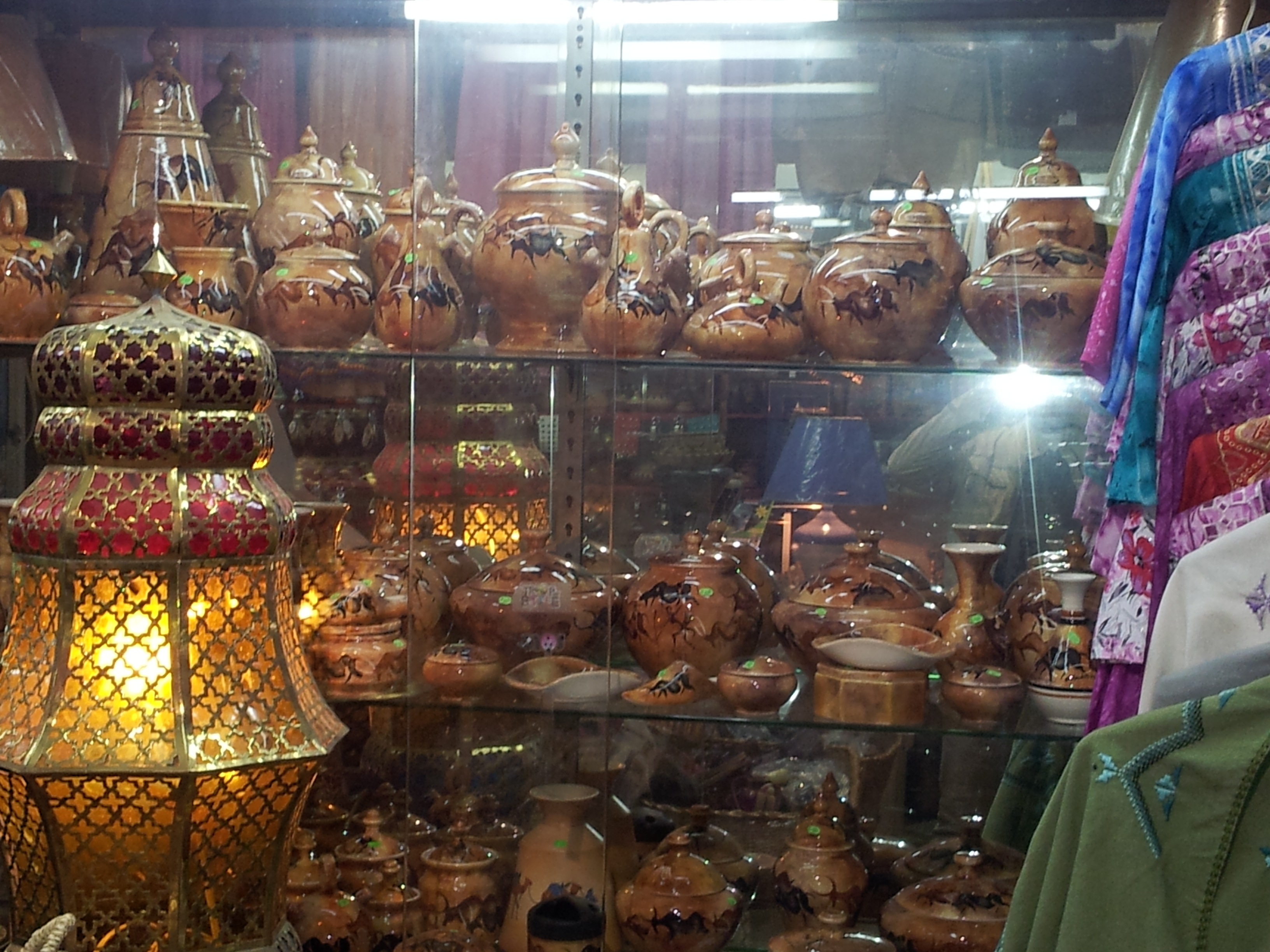 Poterie (Artisanat algérien)